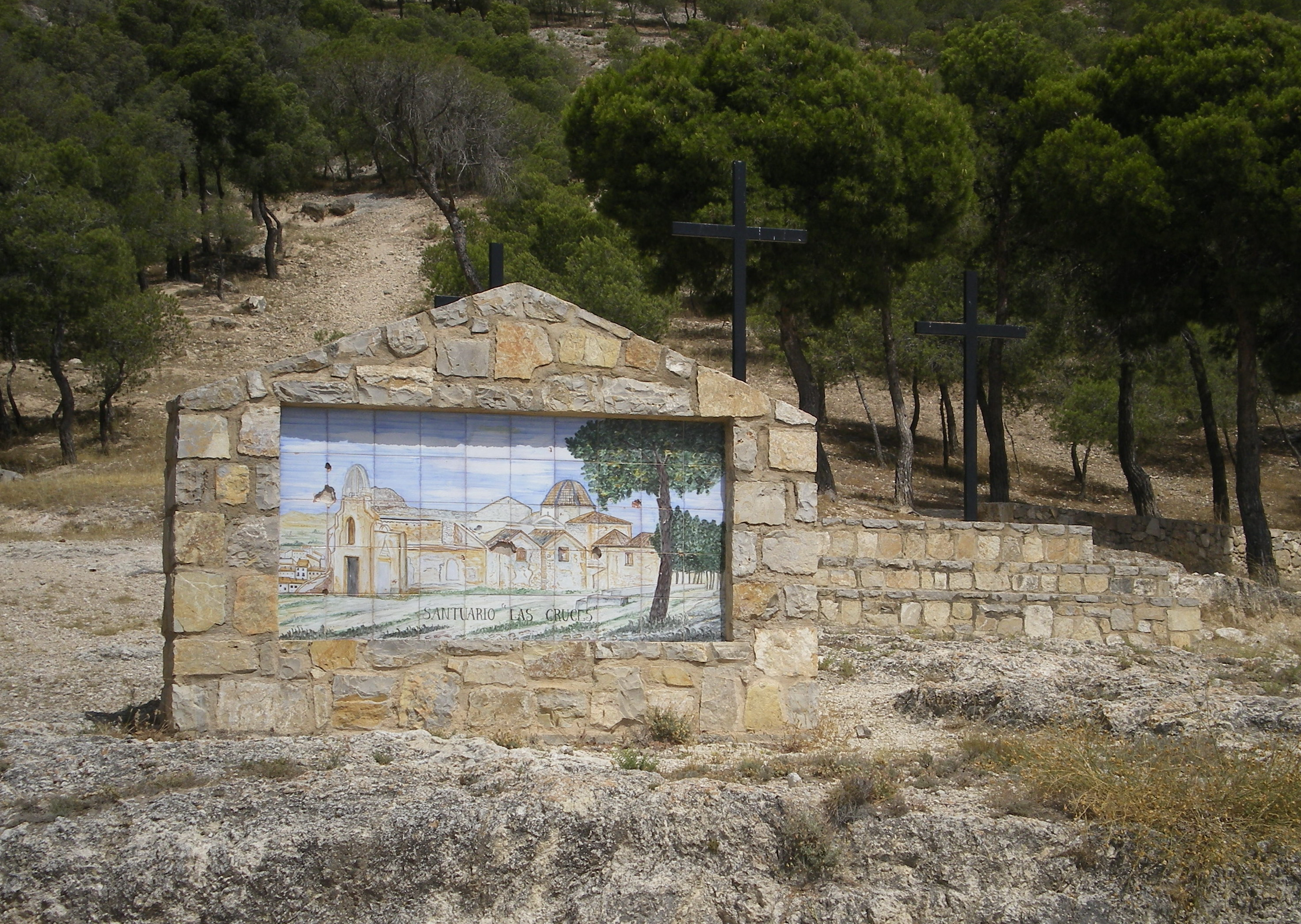 Paraje de Las Cruces (Villena) Alicante, en la actulidad